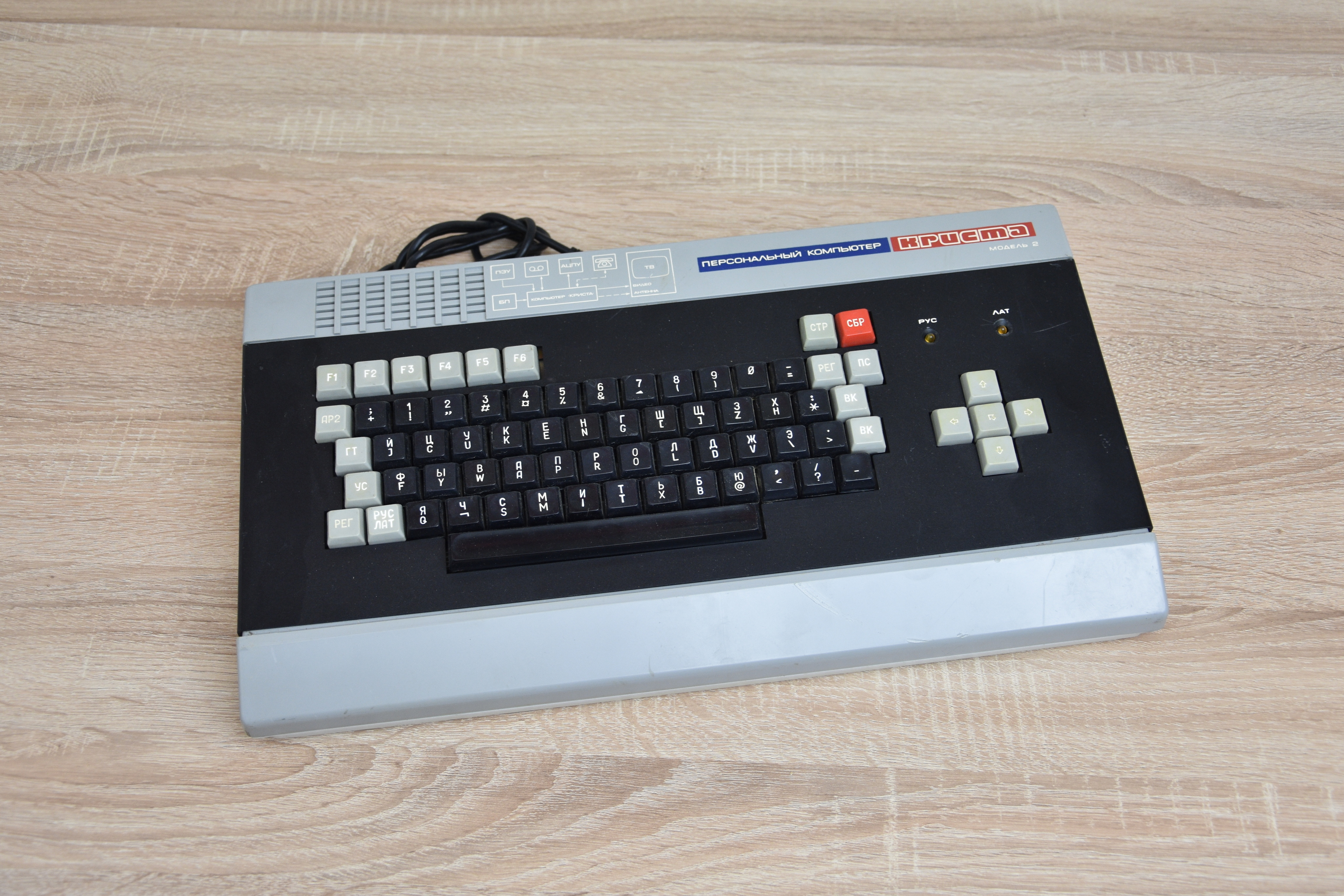 Советский домашний компьютер Криста 2